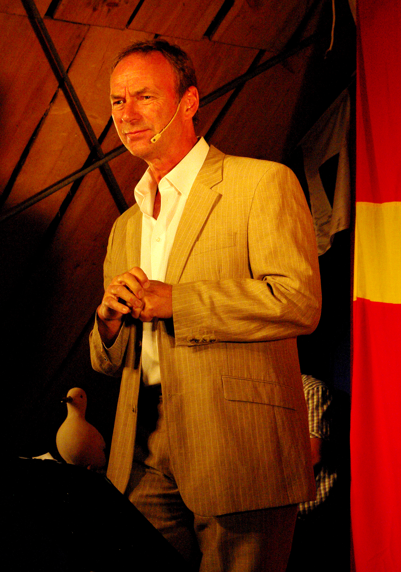 Tommy Juth 2011.